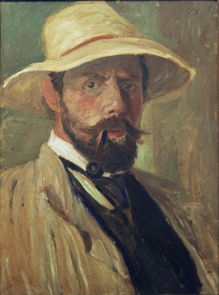 Selbstbildnis